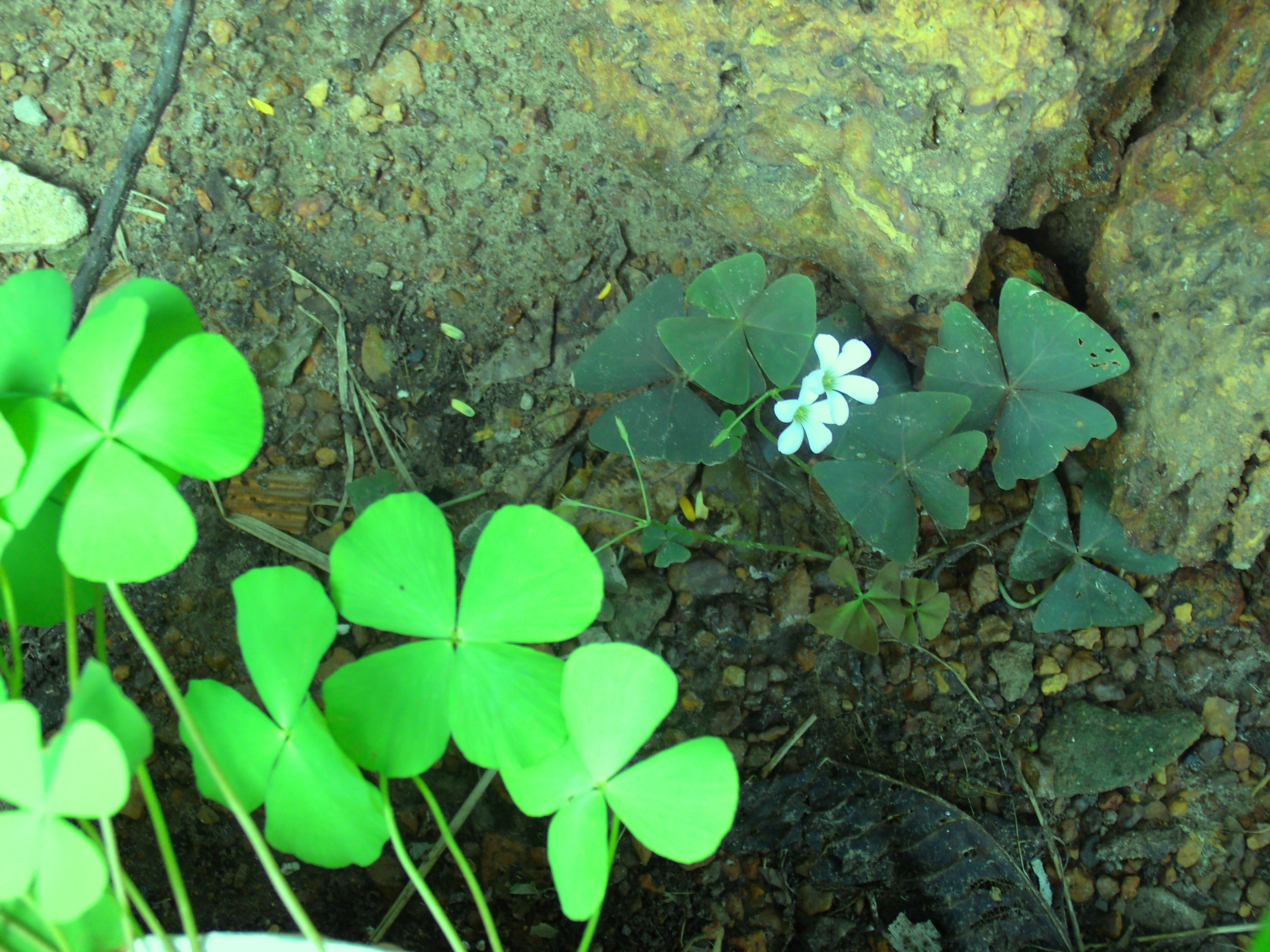 Trevos de quatro folha e trevo e roxo em jardin no Brasil.